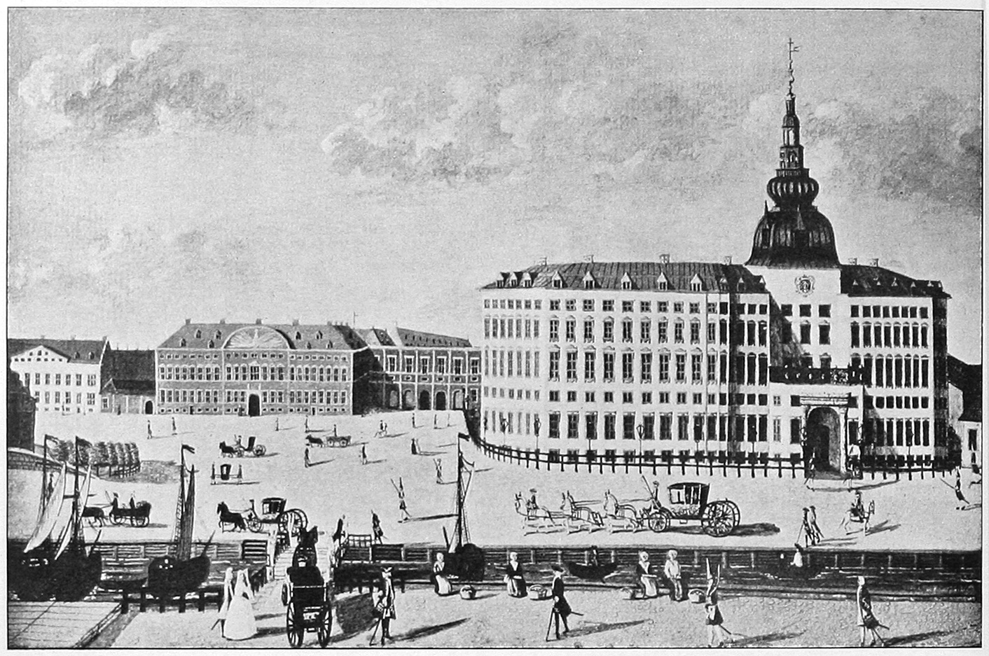 Københavns Slot (Copenhagen Castle), around 1730